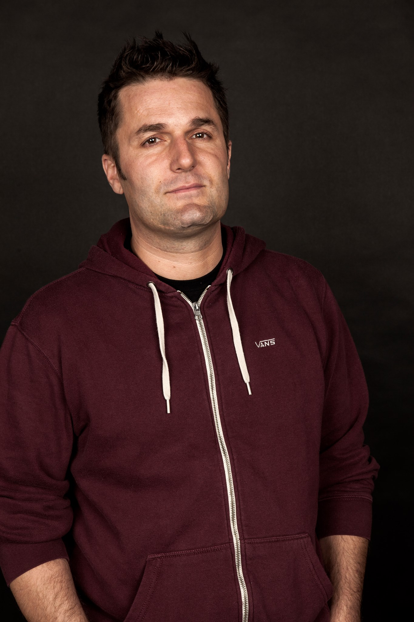 promofoto 2014